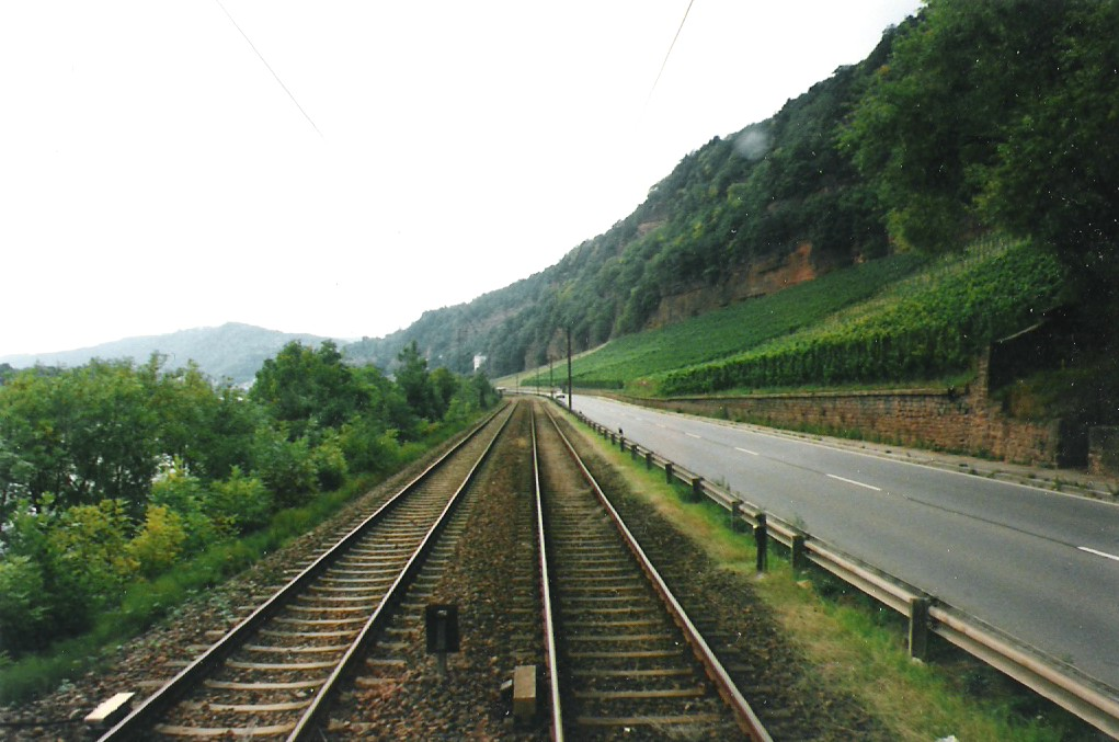 Die Trierer Weststrecke zwischen Trier-Biewer und Trier-Pallien während einer Sonderzugfahrt am 14. September 1996. Rechts sind die bis zu 80 m hohen Sandsteinfelsen des Joster- und des Fichtenberges zu sehen.